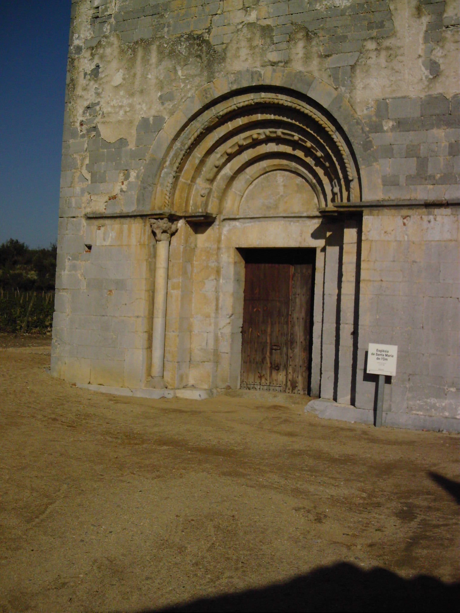 portail de l'église sta Maria de l'Om